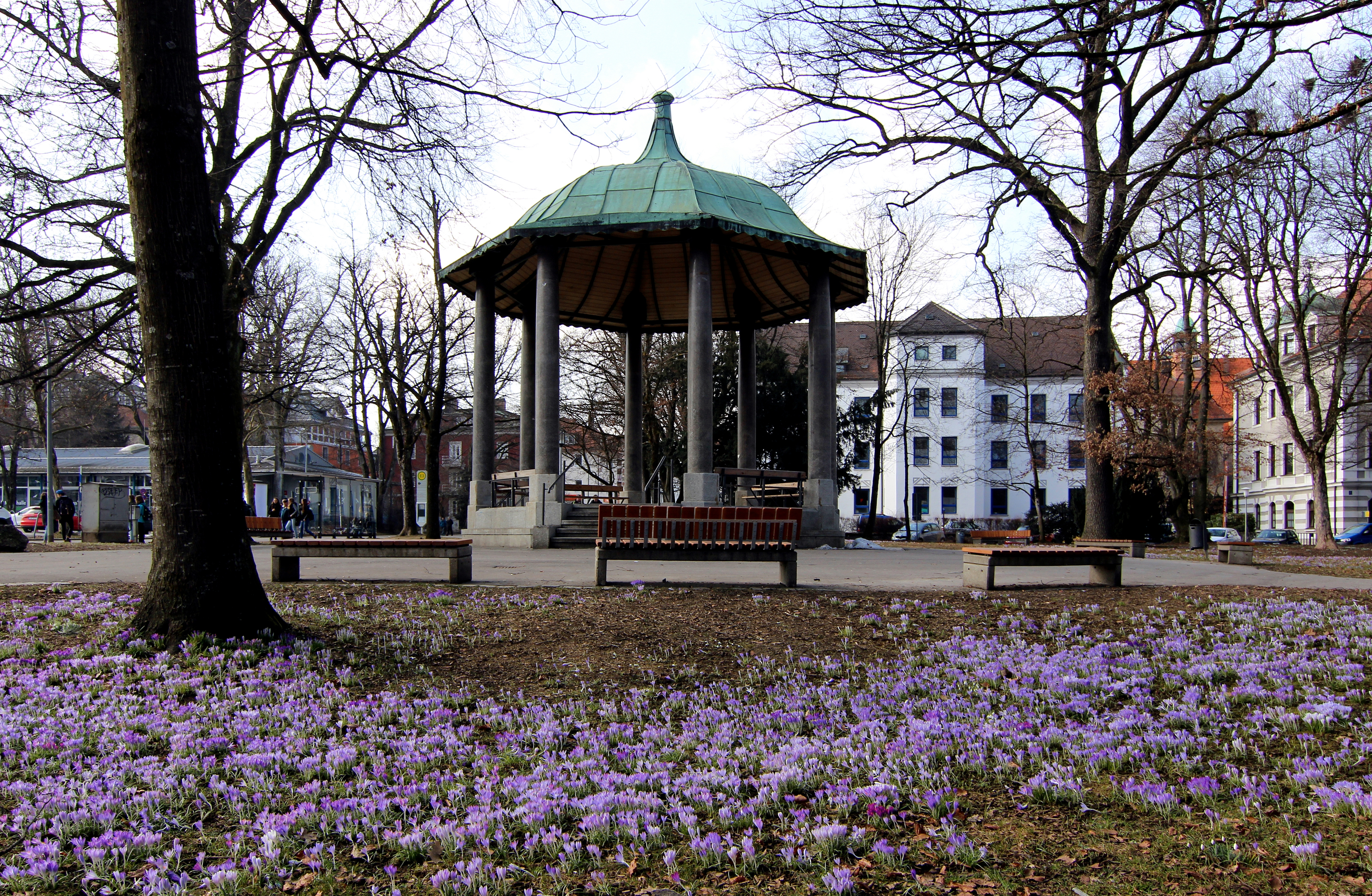 Pavillon im Stadtpark Kempten